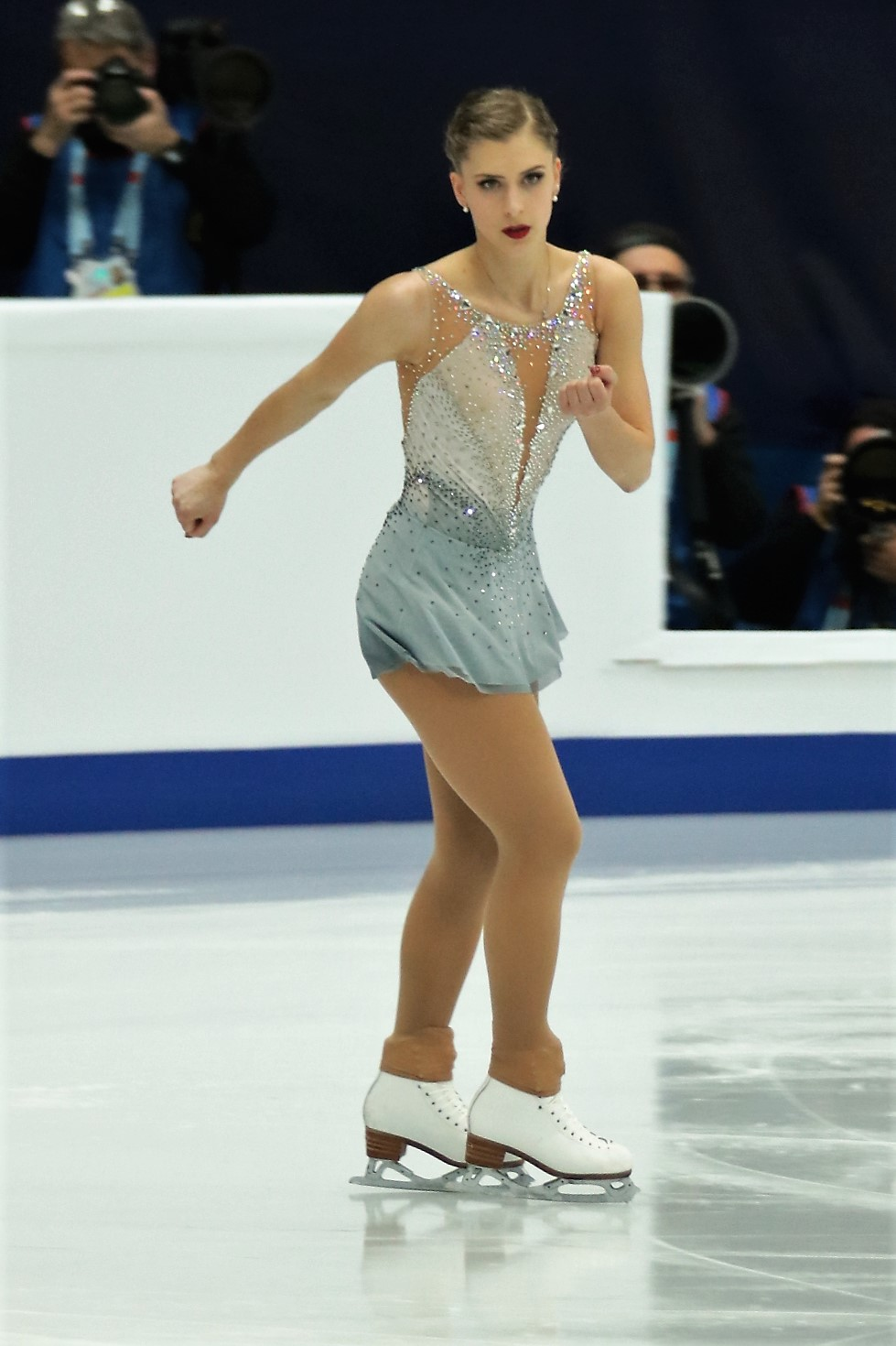 Элишка Бржезинова (Чехия) на Чемпионате Европы по фигурному катанию 2018.